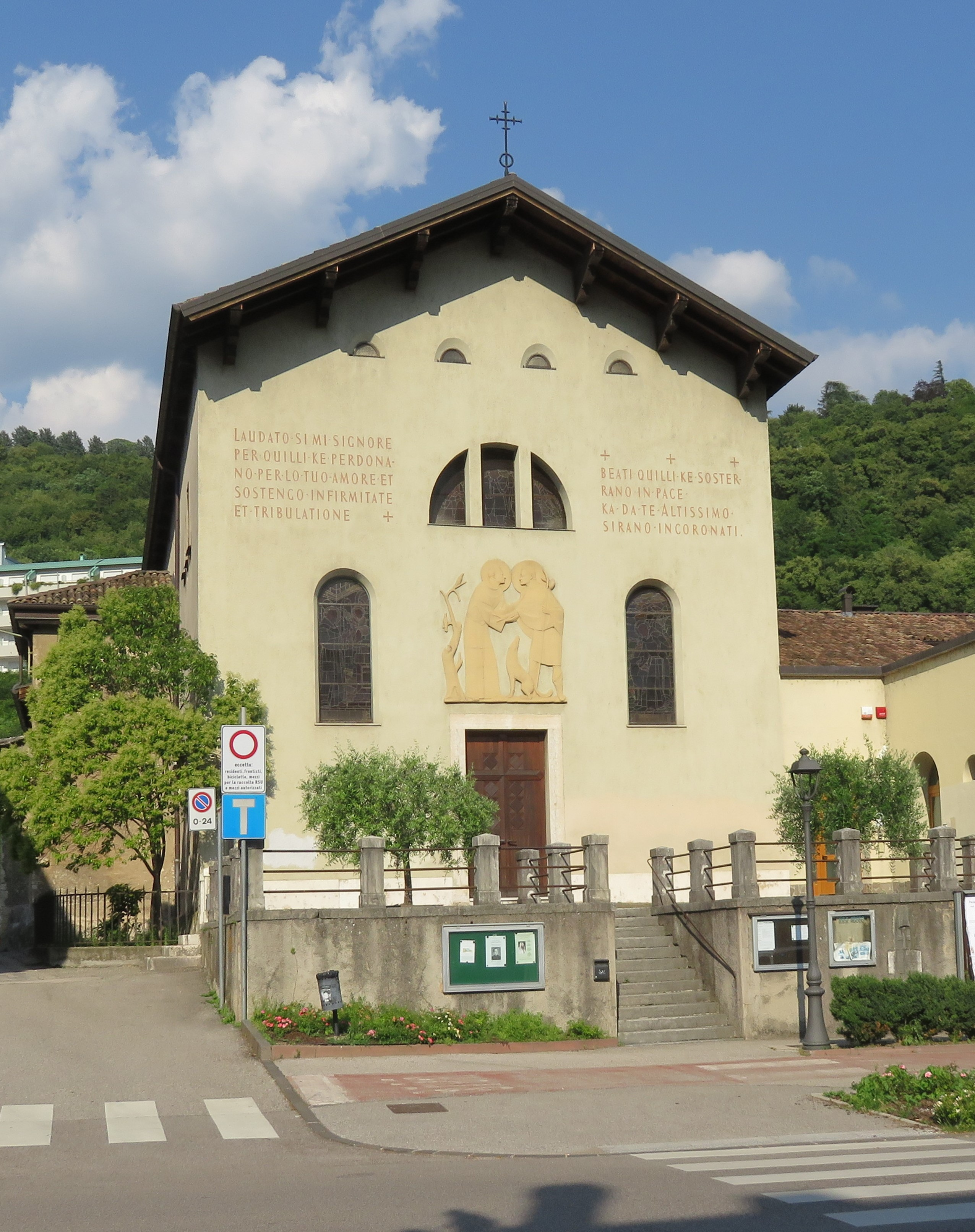 Facciata della chiesa